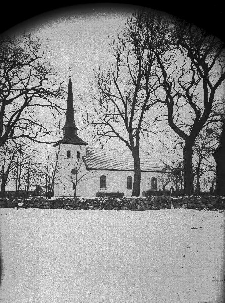 Kyrkan från sydväst efter återuppbyggnaden 1923. Kategori: (01) ExteriörerKyrkan från sydväst efter återuppbyggnaden 1923.